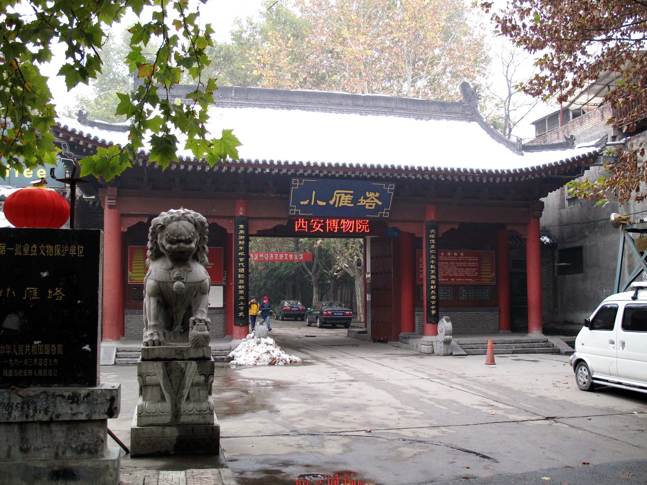 西安博物院正门，小雁塔在西安博物院内